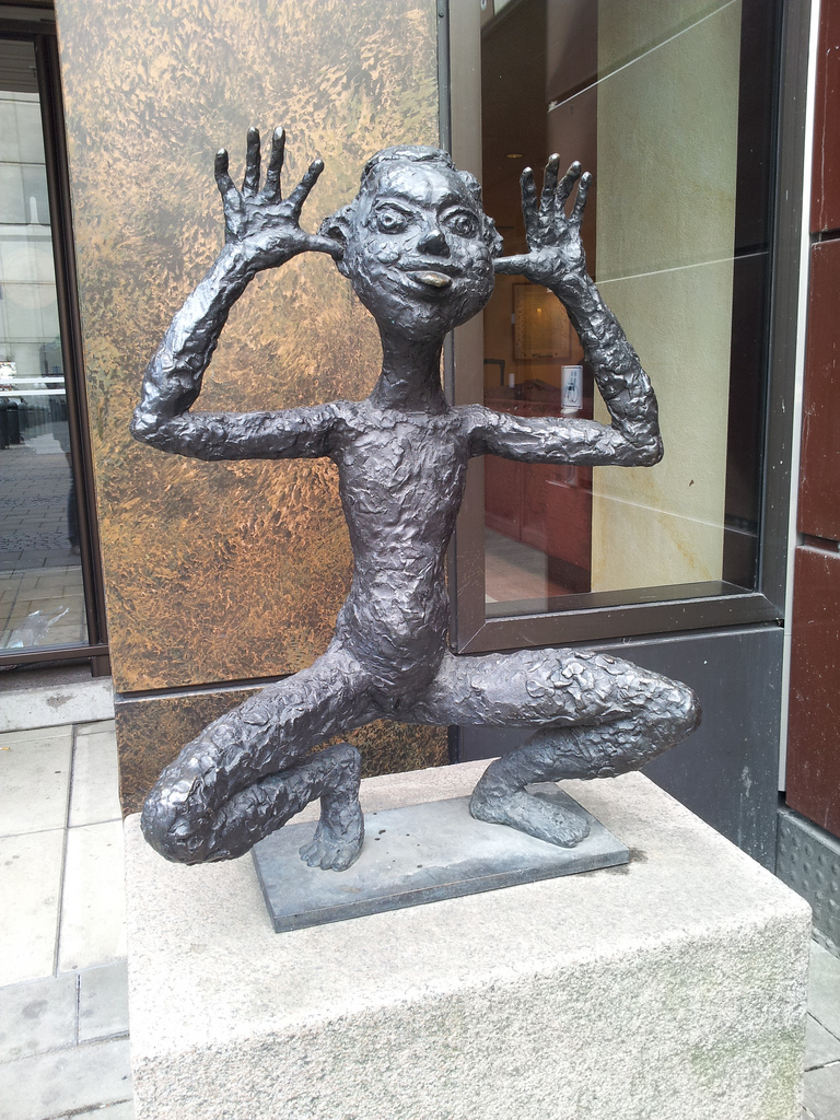 Girl Making a Face, skulptur av Lena Cronqvist (f. 1938) på Beridarebansgatan i Stockholm, vid Brunkebergstorg. Rest 2003.